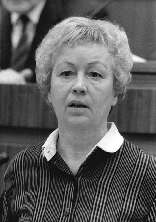 ADN-ZB/Mittelstädt 17.6.86-Berlin: Volkskammertagung In der Diskussion sprach für die Fraktion des FDGB die Abgeordnete Prof. Dr. Johanna Töpfer.